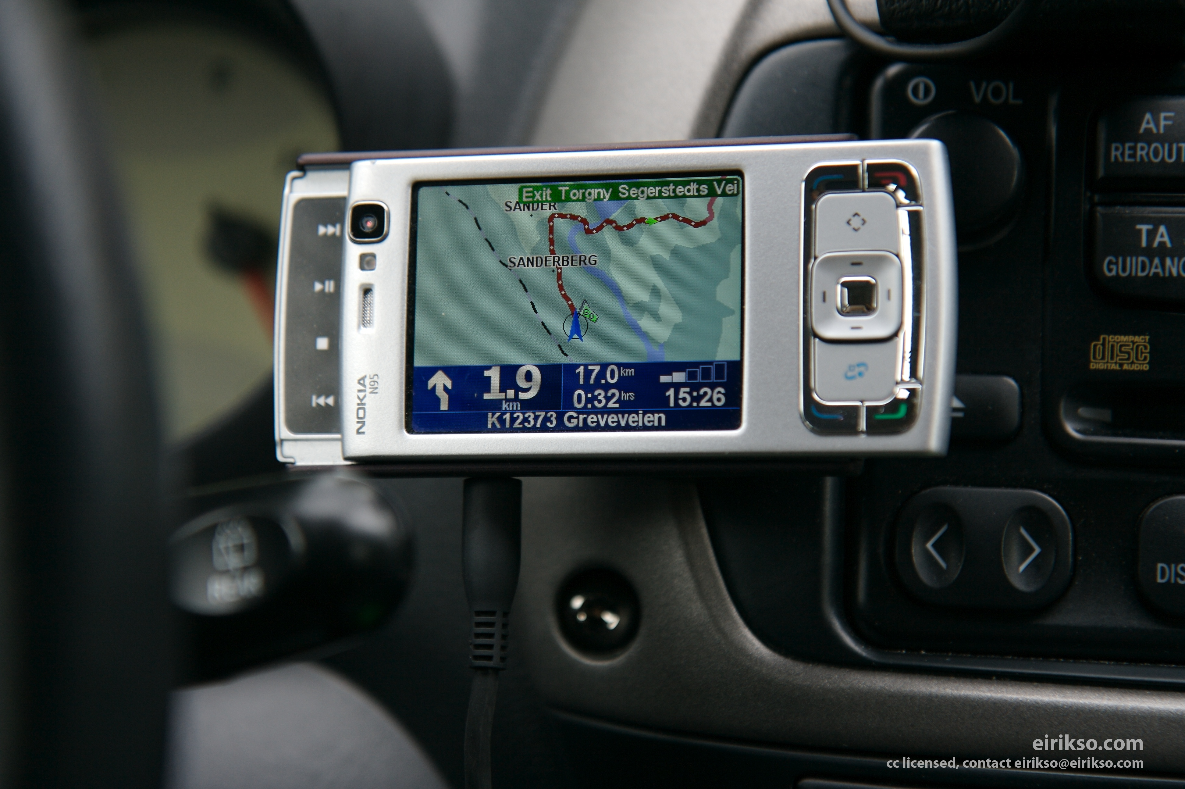 Nokia N95 running TomTom Navigator